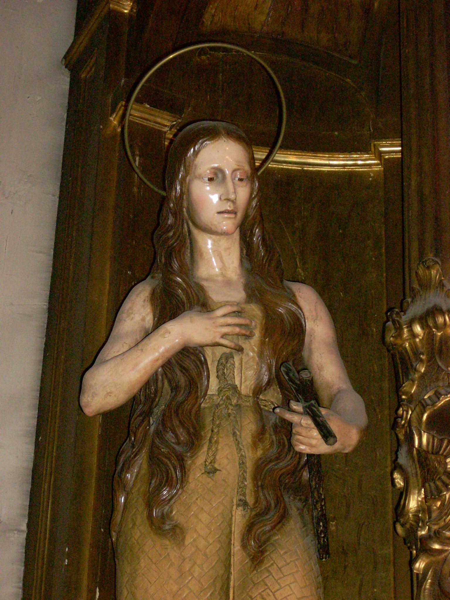 Detalle de la Magdalena penitente, iglesia de las Escuelas Pías de San Antón, Madrid.